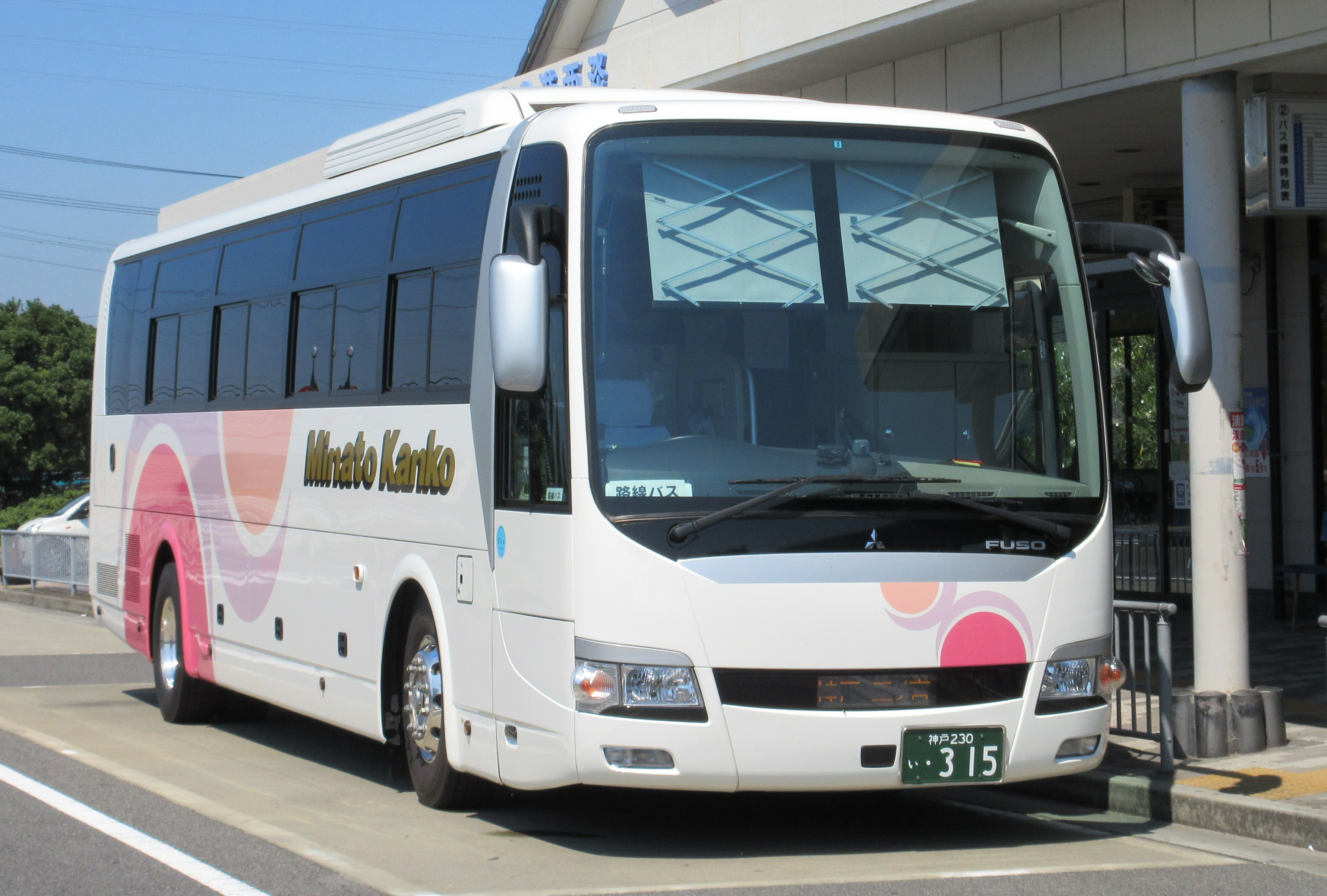 みなと観光バス315(陸の港西淡にて)